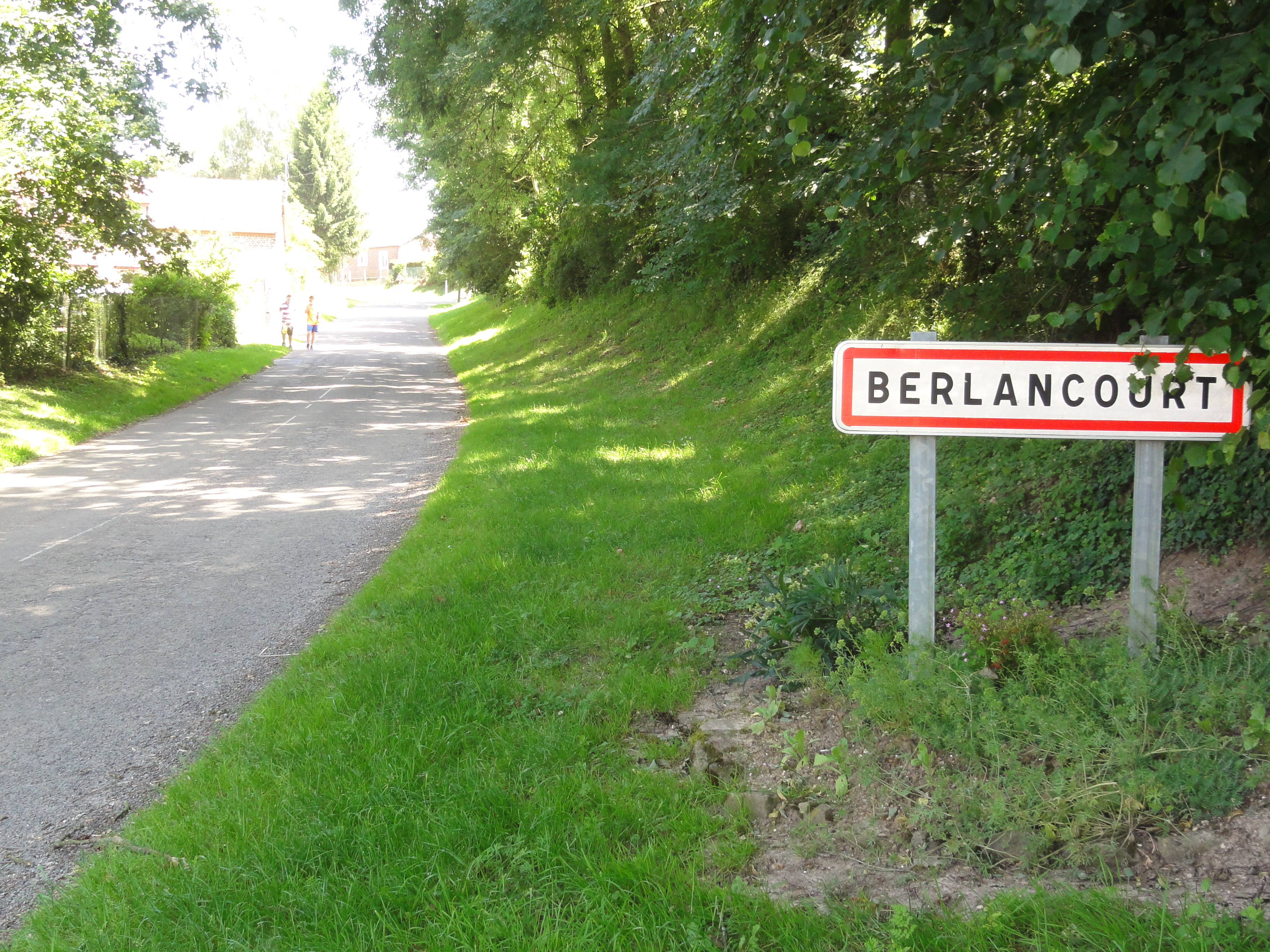 Berlancourt (Aisne) city limit sign